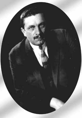 Беларуская (тарашкевіца): Язэп Дыла